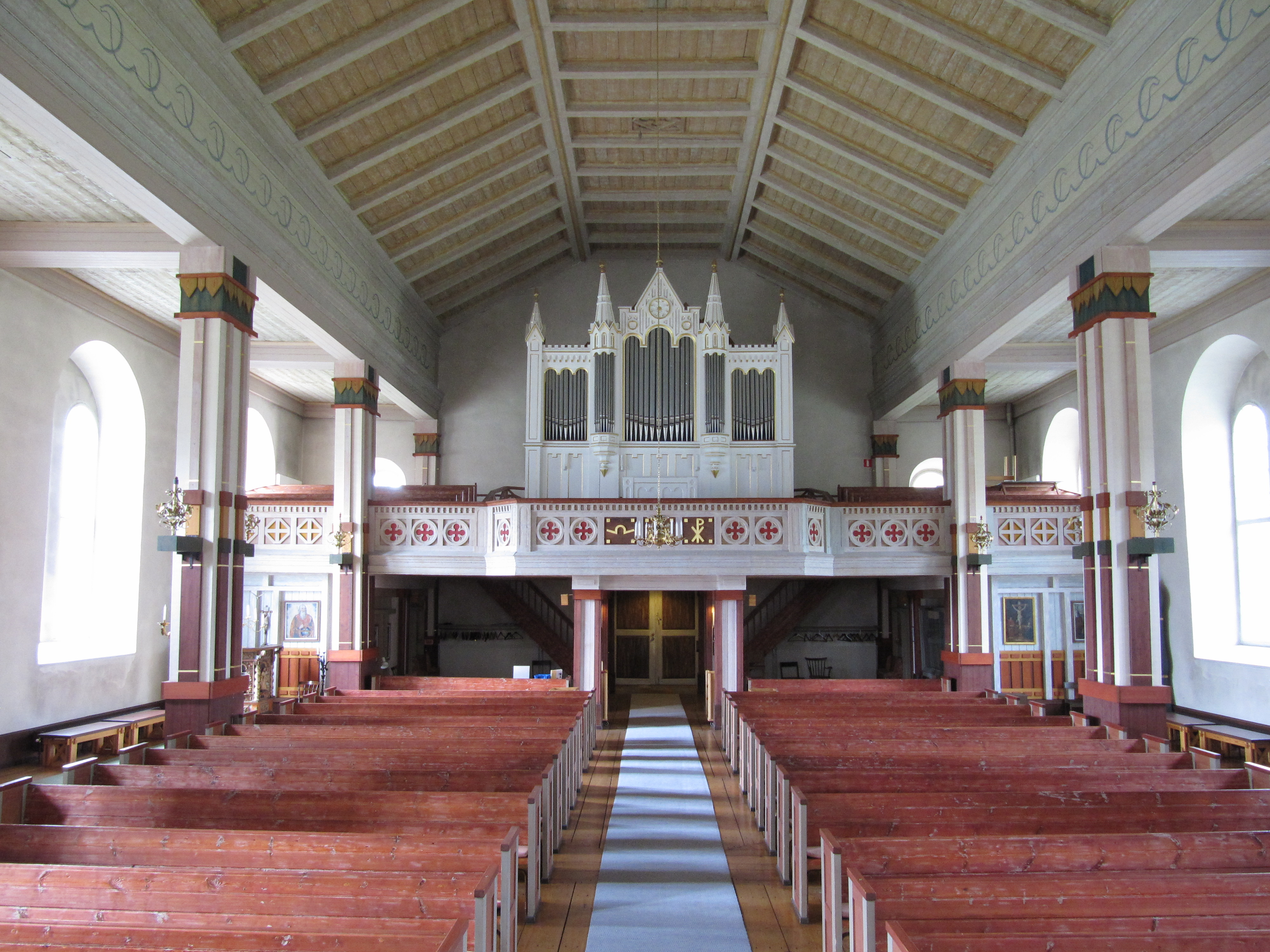 Vy mot orgelläktare i Vrigstads kyrka